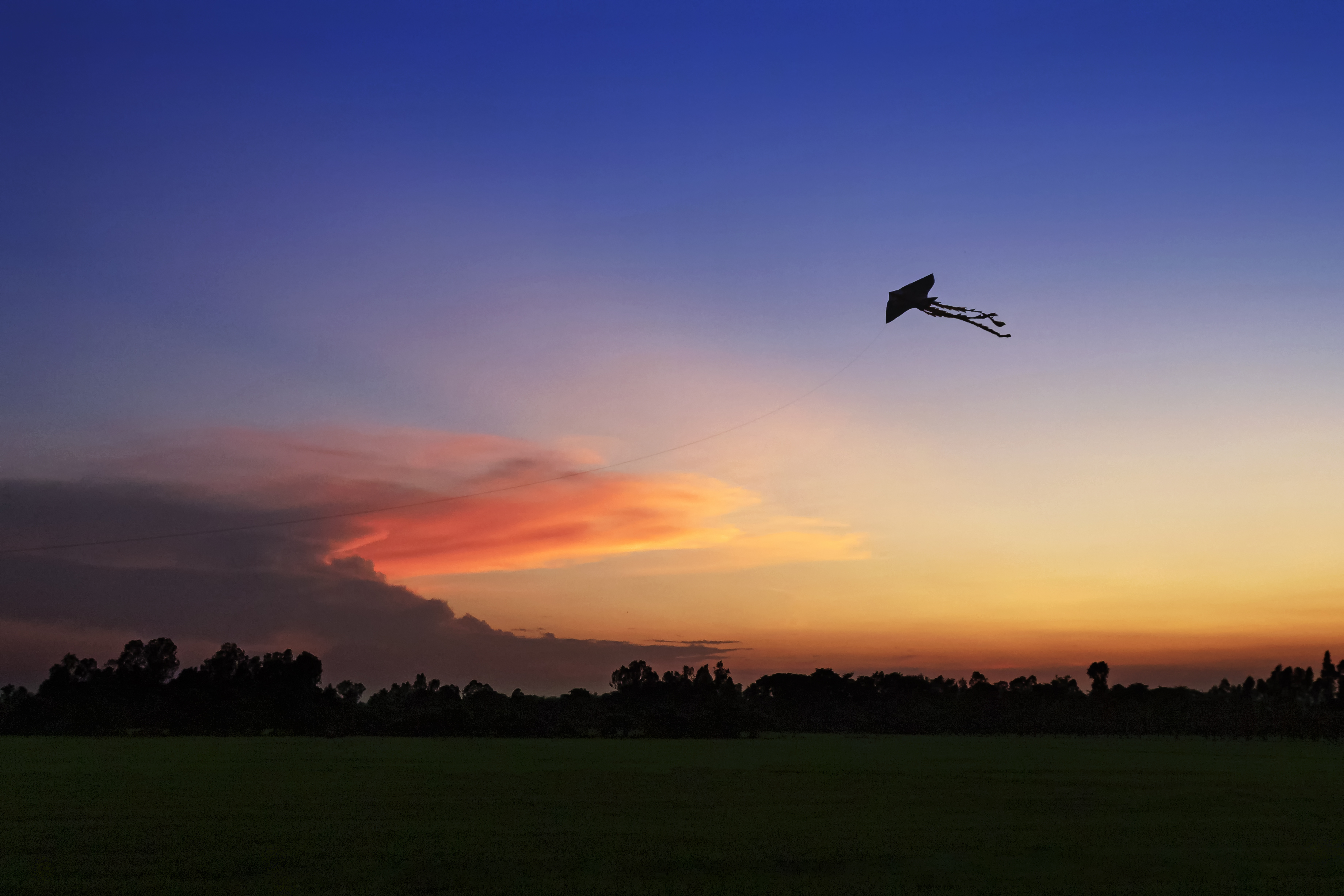 Cánh diều nhỏ bay trong chiều. Chụp ở Long Xuyên, Việt Nam.